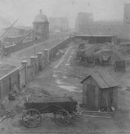 Ummauerter Lagerplatz für den Kohlehandel der Familie um Richard Stephanus in Linden vor Hannover, gesehen entlang der ehemaligen Königinnenstraße (heute: Fössestraße) bis zur Ecke der Pavillonstraße. Etwas oberhalb der Bildmitte ist links der später im Jahr 1911 abgebrochene Küchengarten-Pavillon zu sehen ...